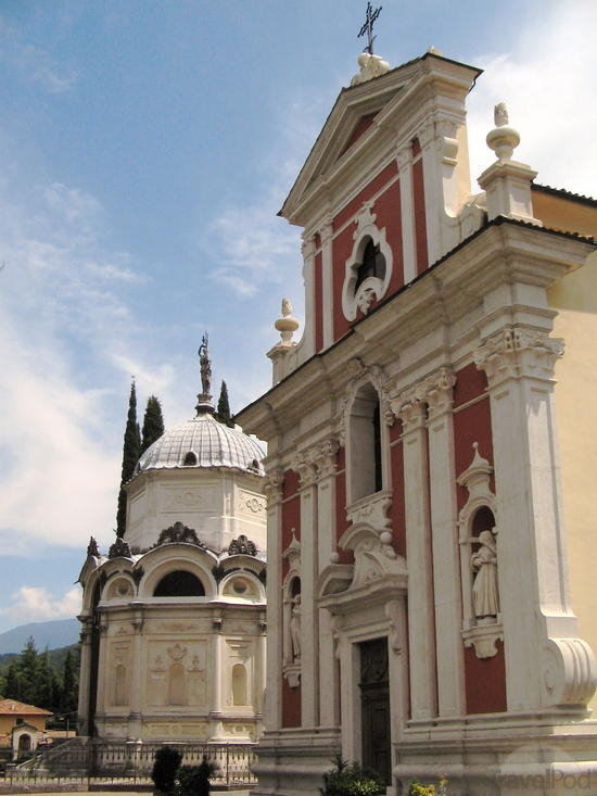 Rovereto, la chiesa della Madonna del Monte